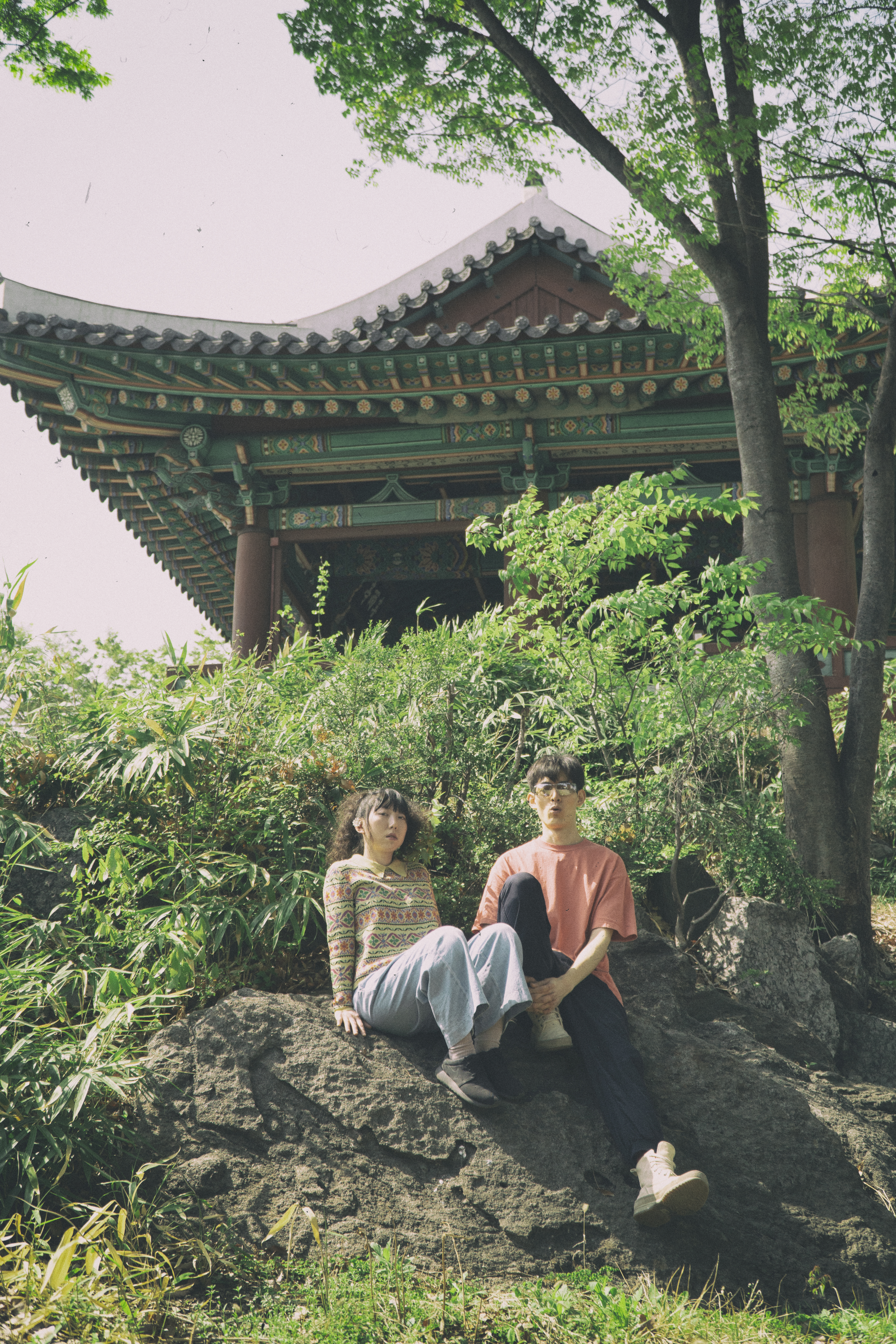 향니